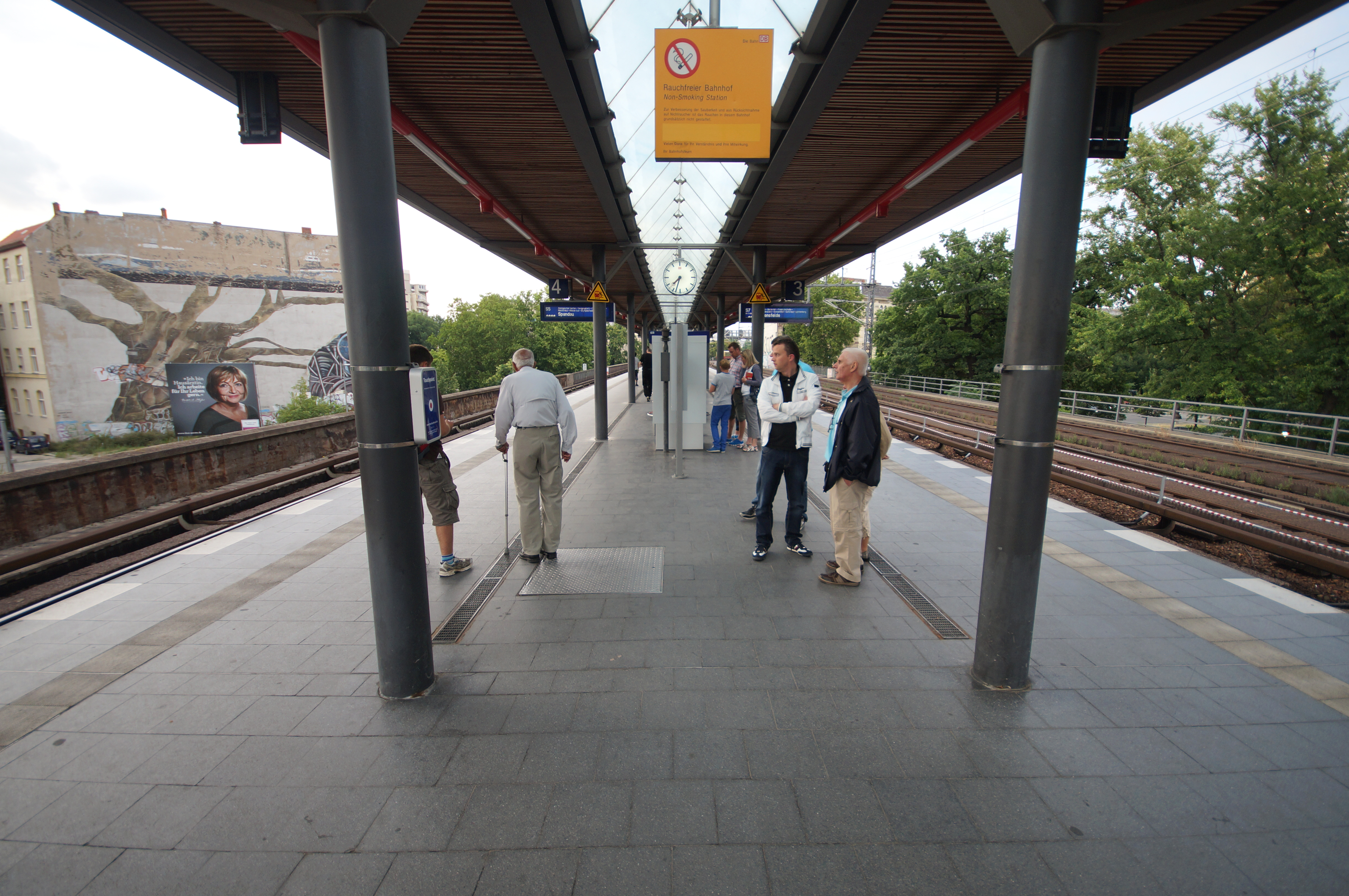 Die Bahnsteige des Bahnhofs Berlin-Tiergarten auf der Berliner Stadtbahn